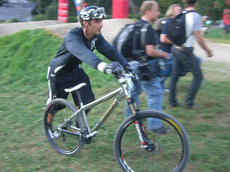 Cedric Gracia beim 4 Cross Worldcup in Schladming (2006)